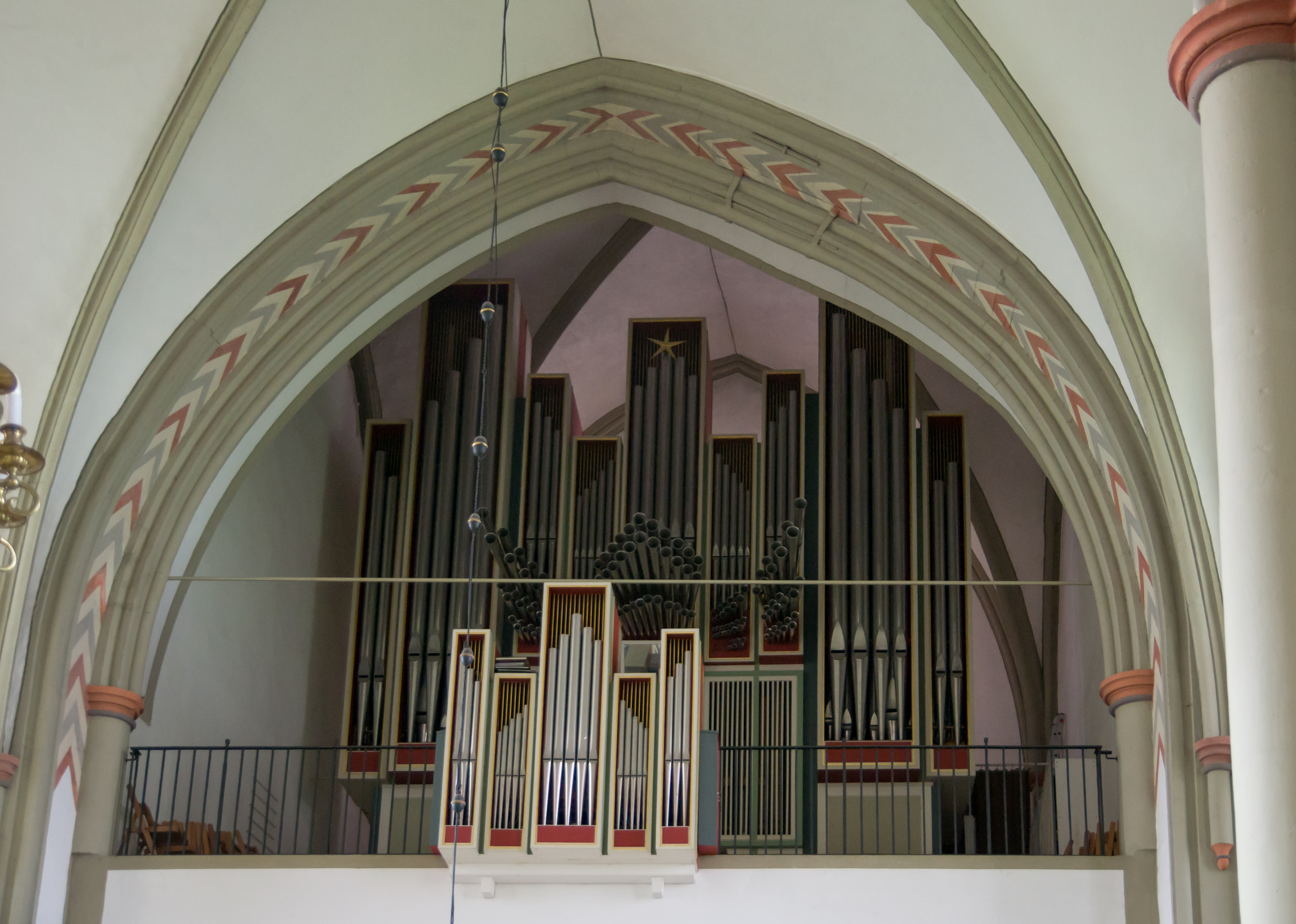 This image shows a heritage building in Germany, located in the North Rhine-Westphalian city Lemgo. Hauptorgel der Firma Paul Ott in der evangelisch-lutherischen Kirche St. Marien in Lemgo